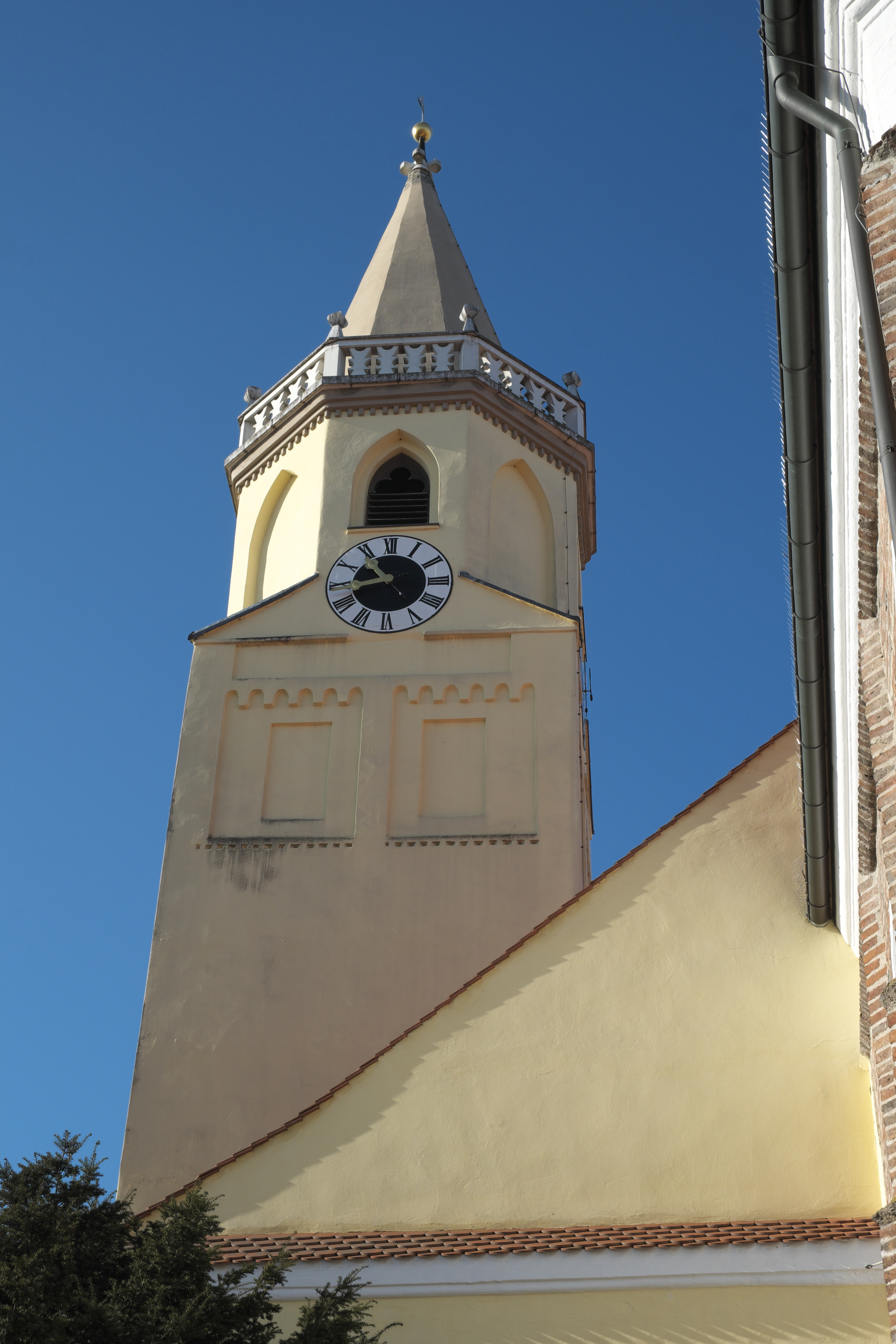 Katholische Pfarrkirche Mariä Himmelfahrt in Essenbach im Landkreis Landshut (Bayern/Deutschland)